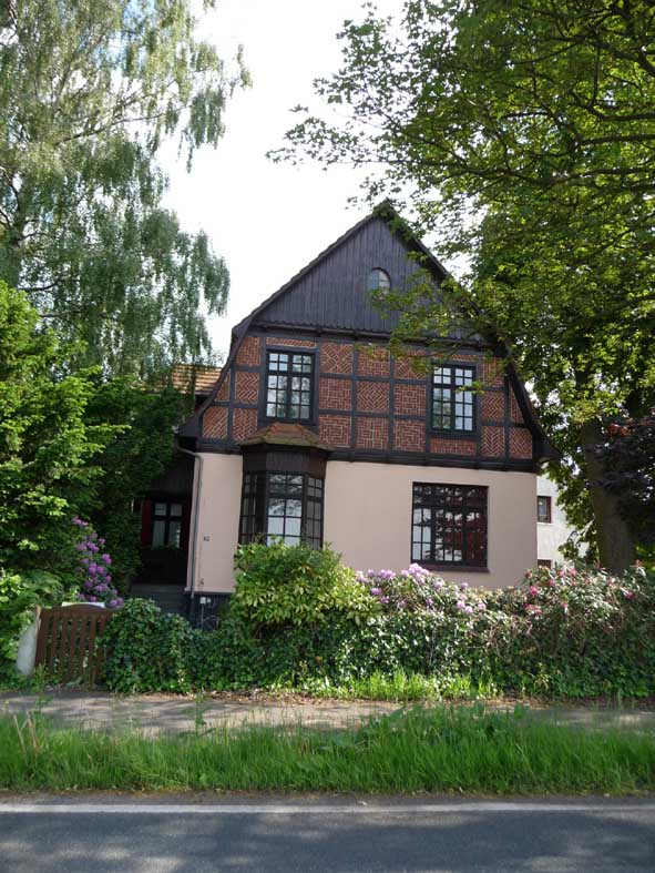 Wohnhaus / Kulturdenkmal lt. Liste des Kr. Pinneberg